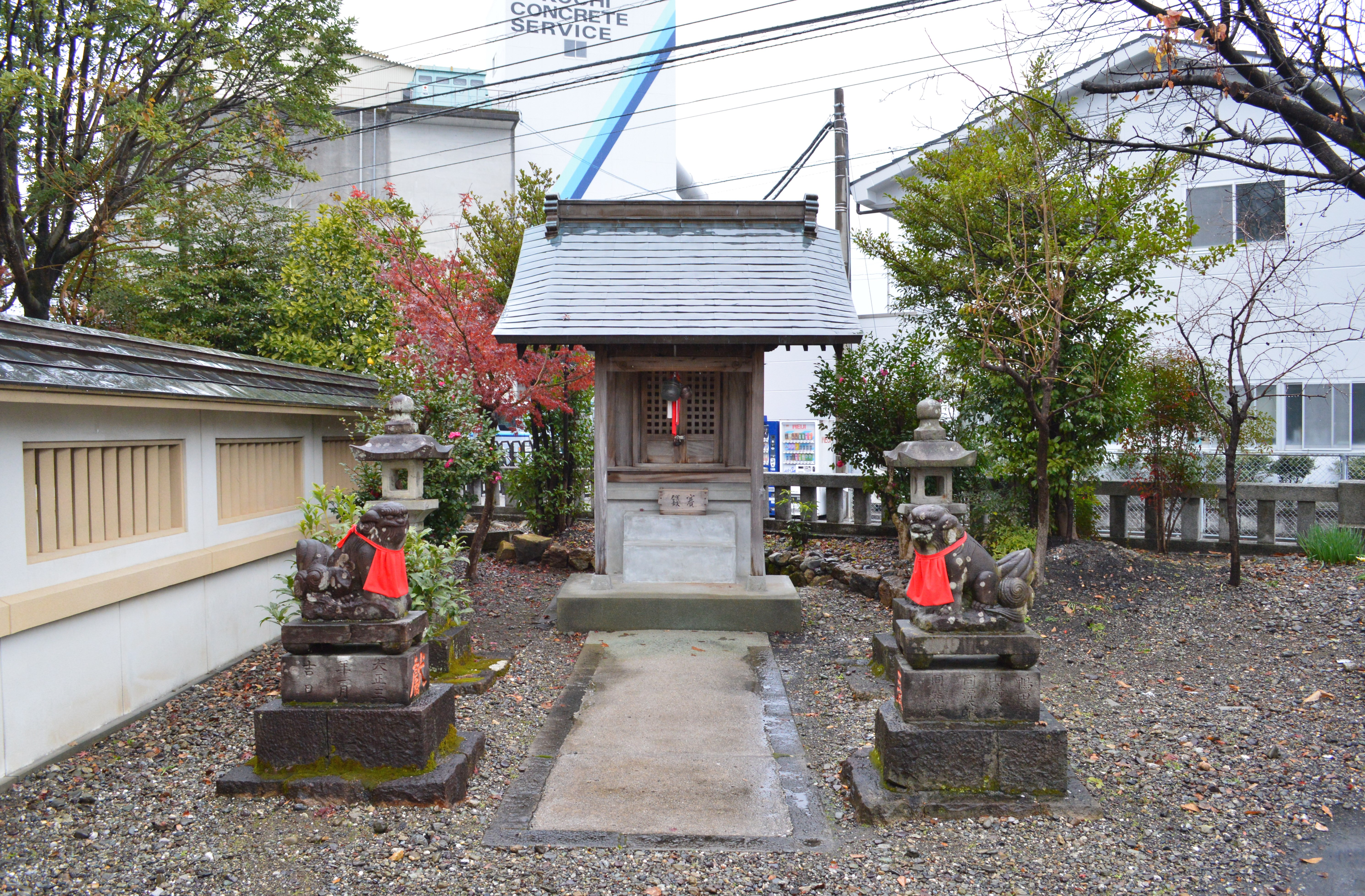 郡頭神社 境内社